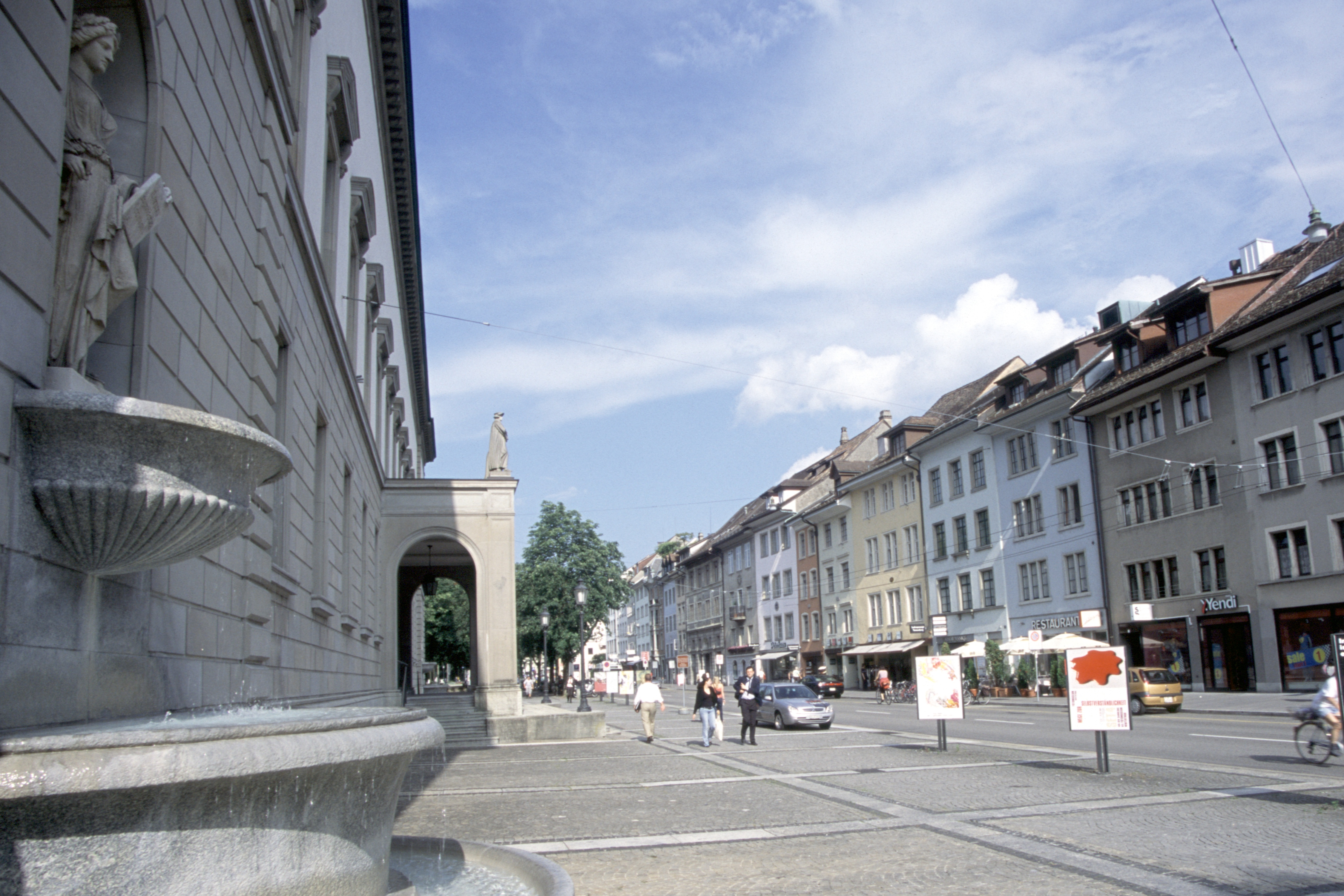 Winterthur Switzerland Stadthausstrasse Museum Oskar Reinhart